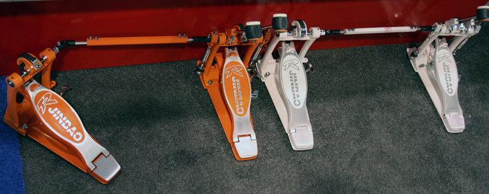 jinbao hardware